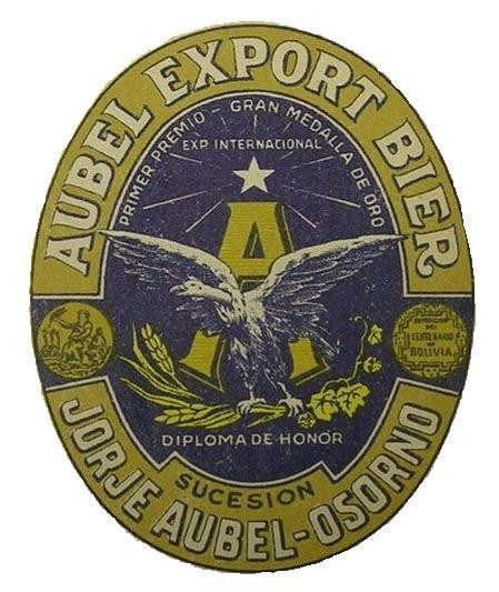 Etiqueta de 1930